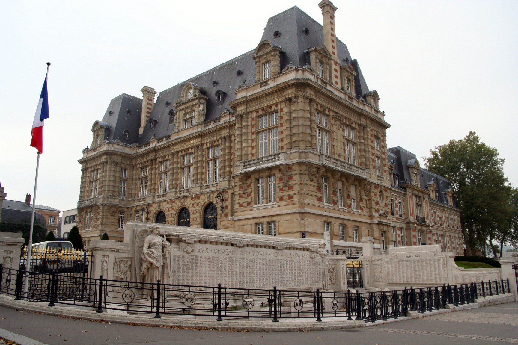 Mairie de Versailles - Yvelines (France)